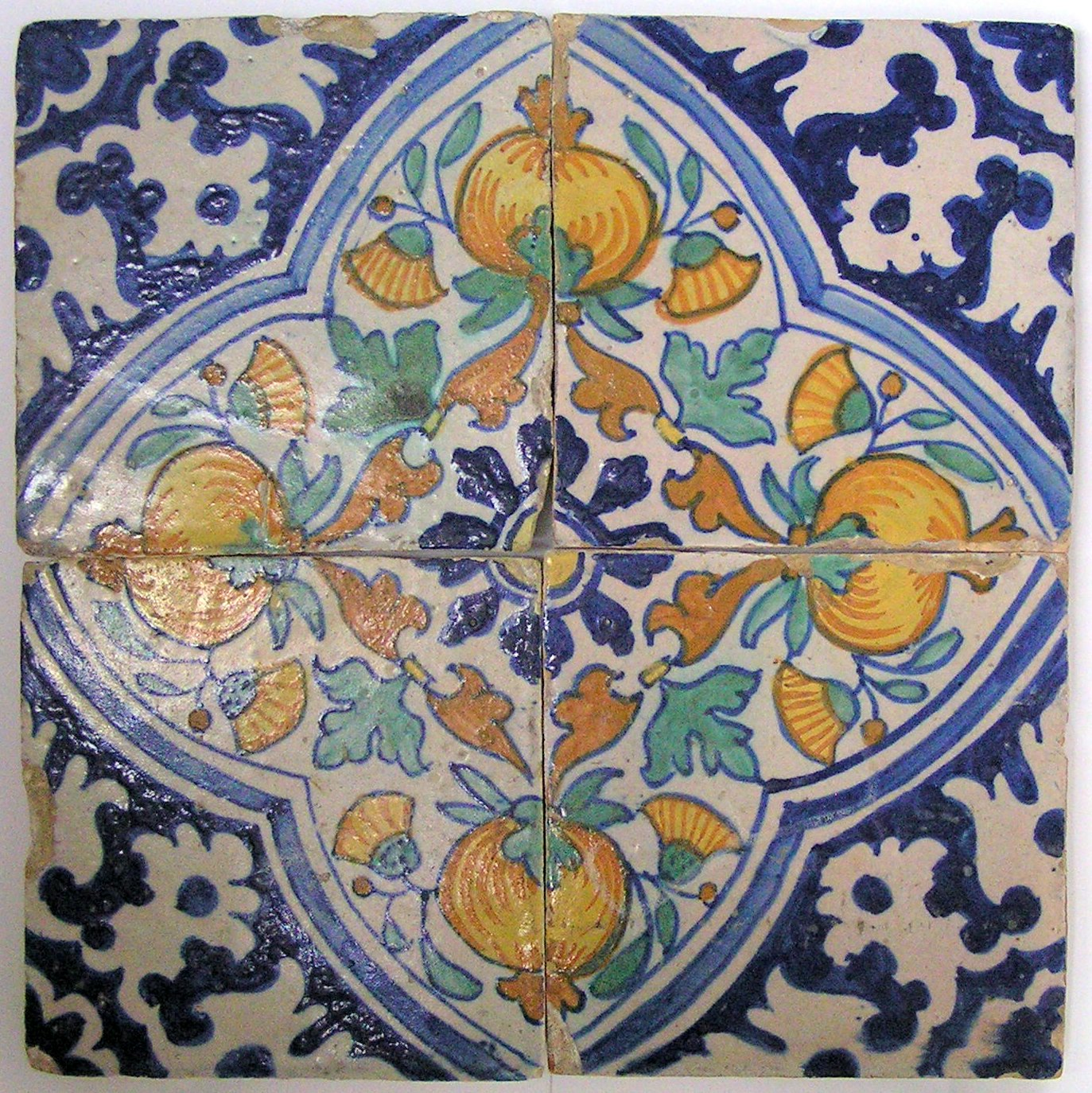 Granaatappel kwadraat.